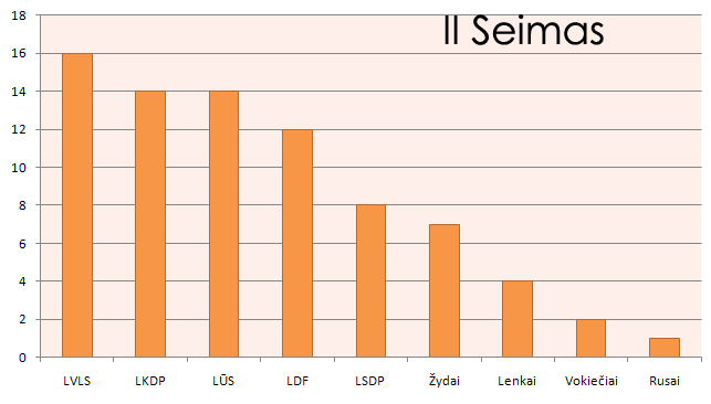 2 Seimas